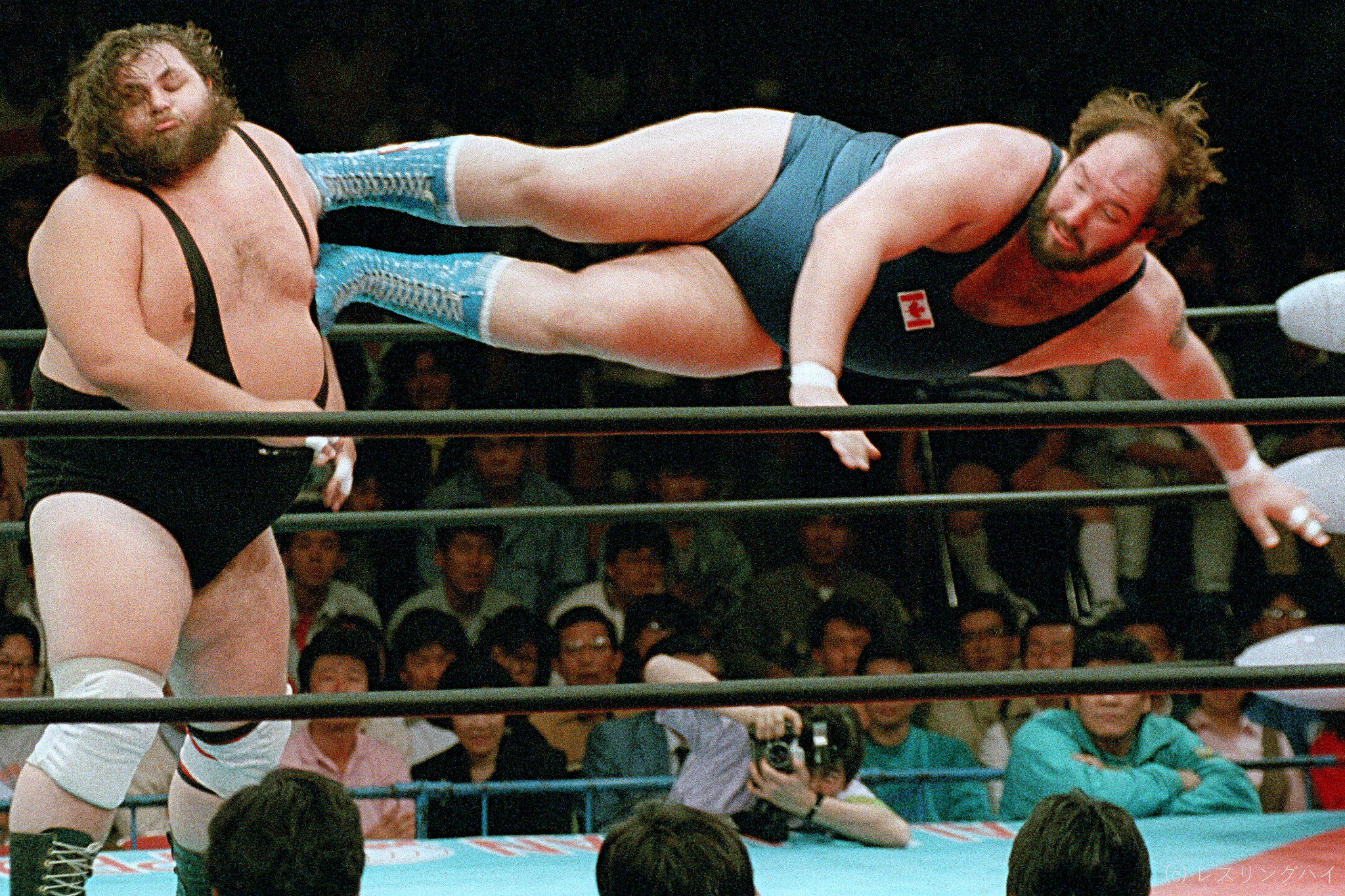 ジョン・テンタの全日本プロレス所属時代に撮影したもの。その巨体からは想像しにくい程に素晴らしい飛形のドロップ・キックを公開。